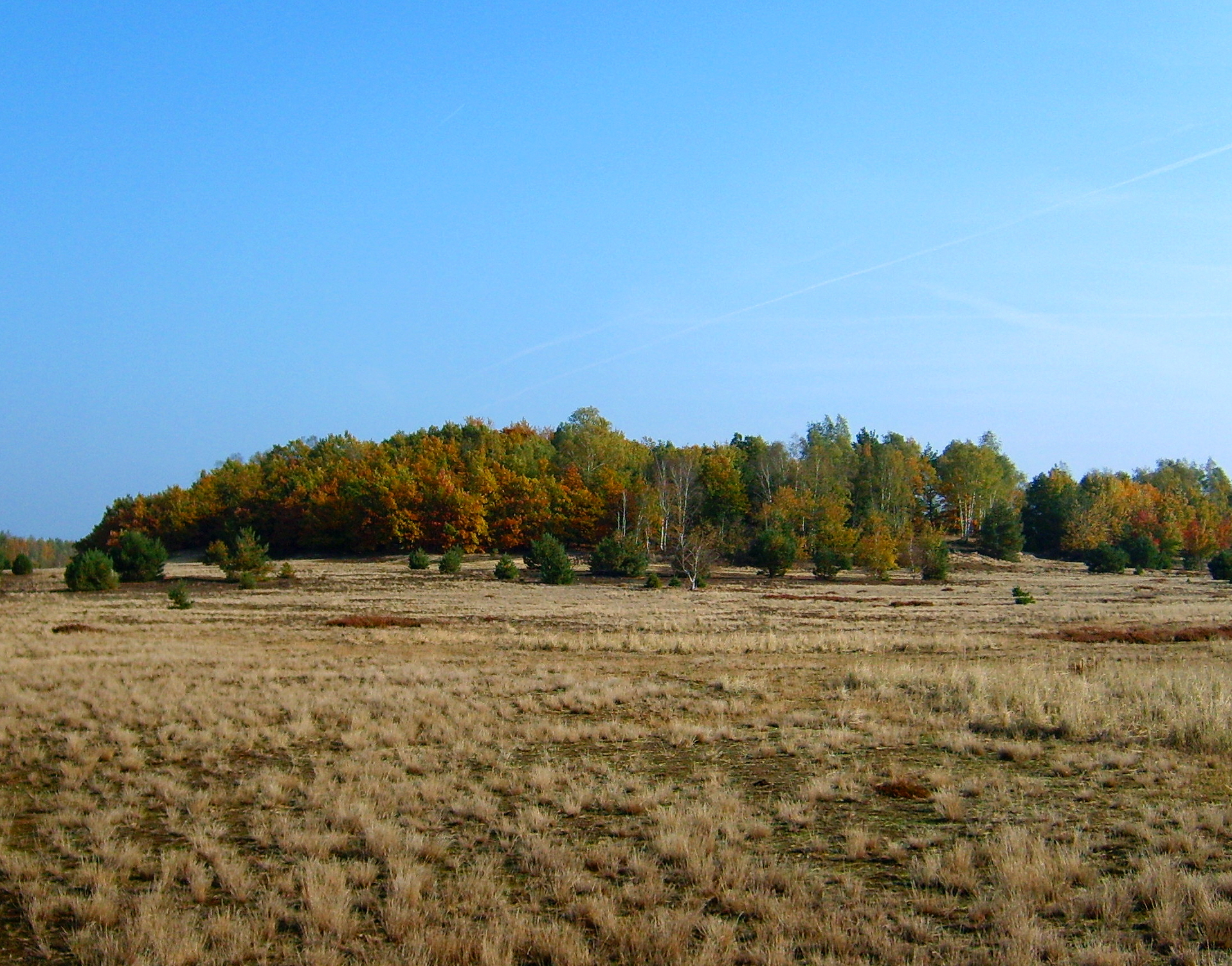 Der Turmberg im NSG Forsthaus Prösa.